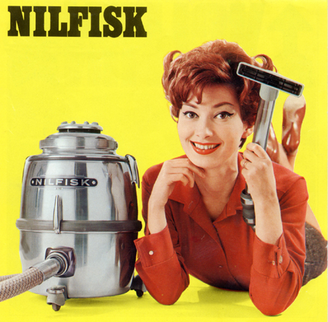 Nilfisk G 70 reklame. Fra midten af 1960'erne.